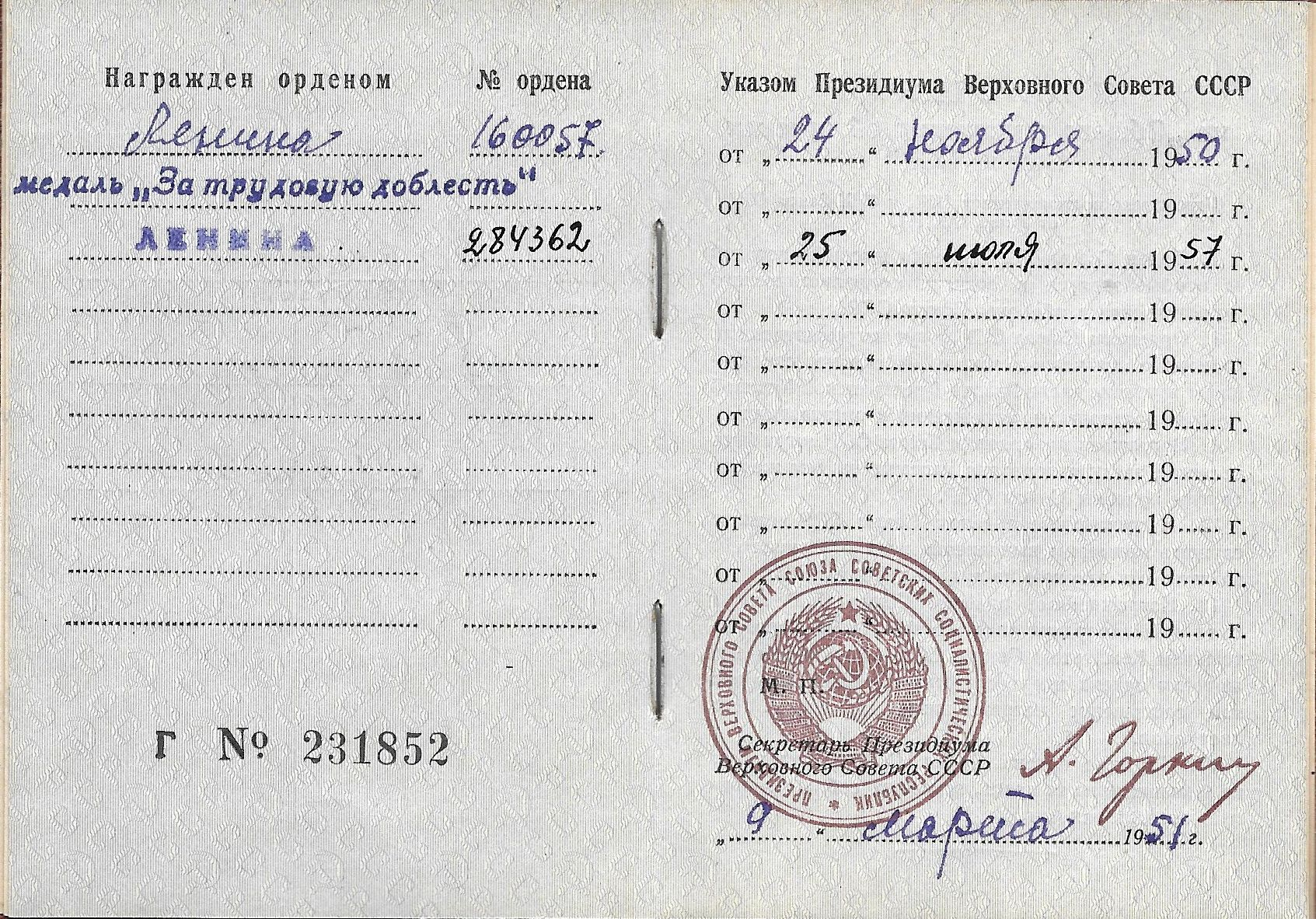 Наградной лист ордена Васильева А. Ф.